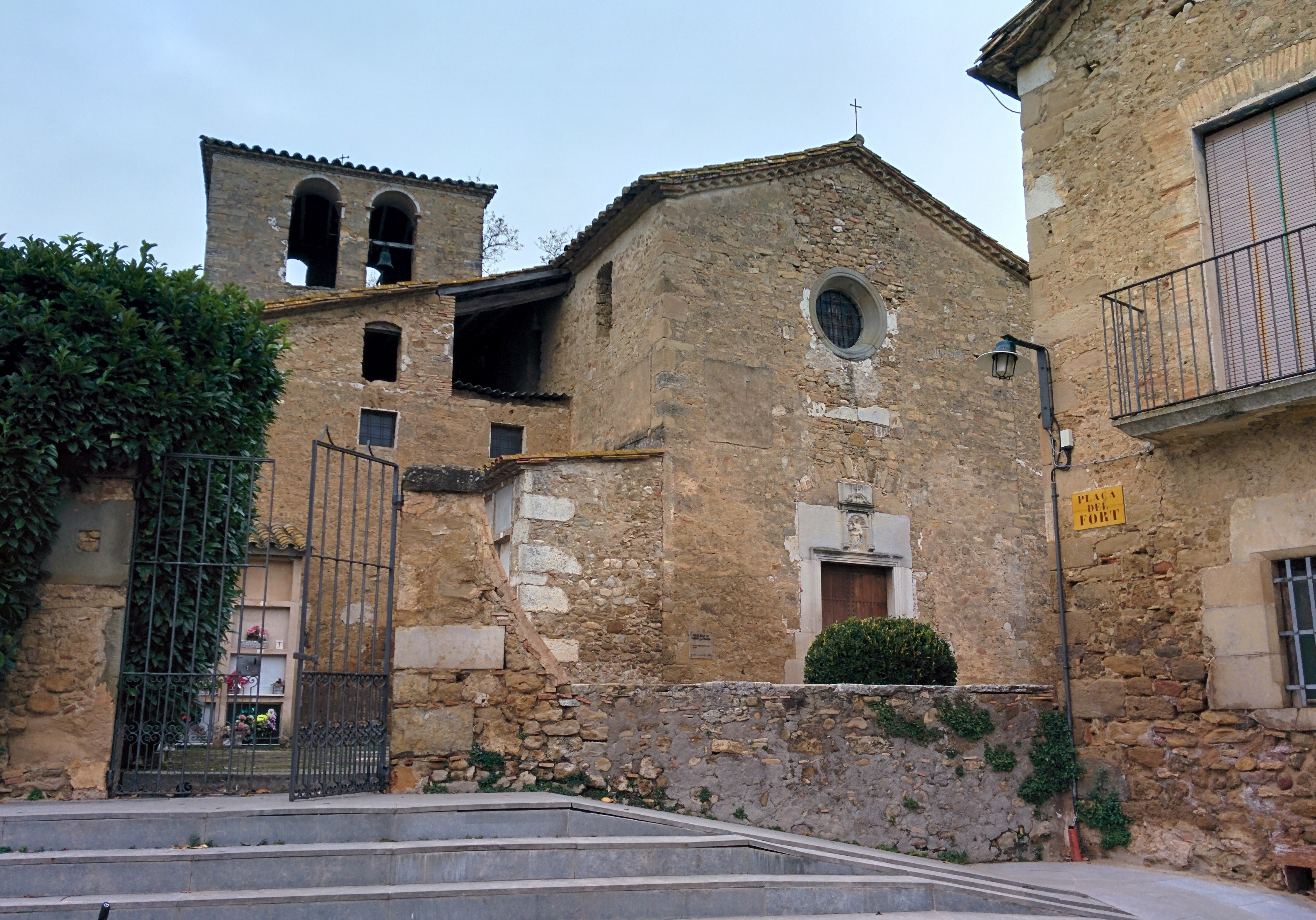 Església parroquial de Santa Llogaia del Terri (Cornellà del Terri)